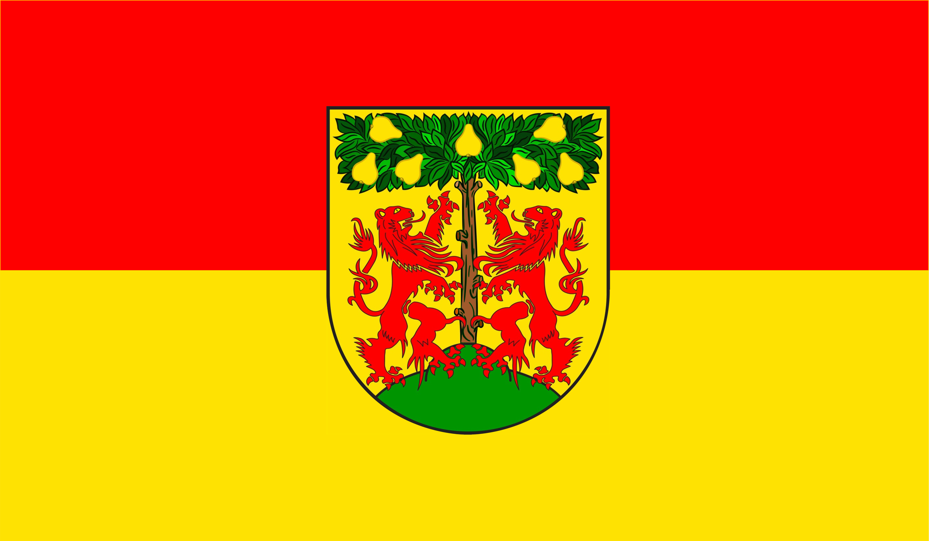 Fahne von Pirna. Die war eigentlich immer rot-gelb und nie gelb-rot.